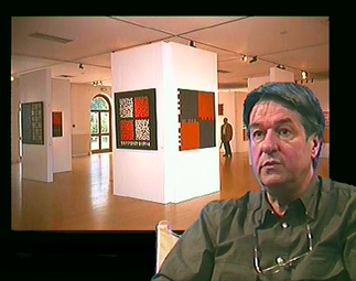 Portrait de Jean-Paul Albinet